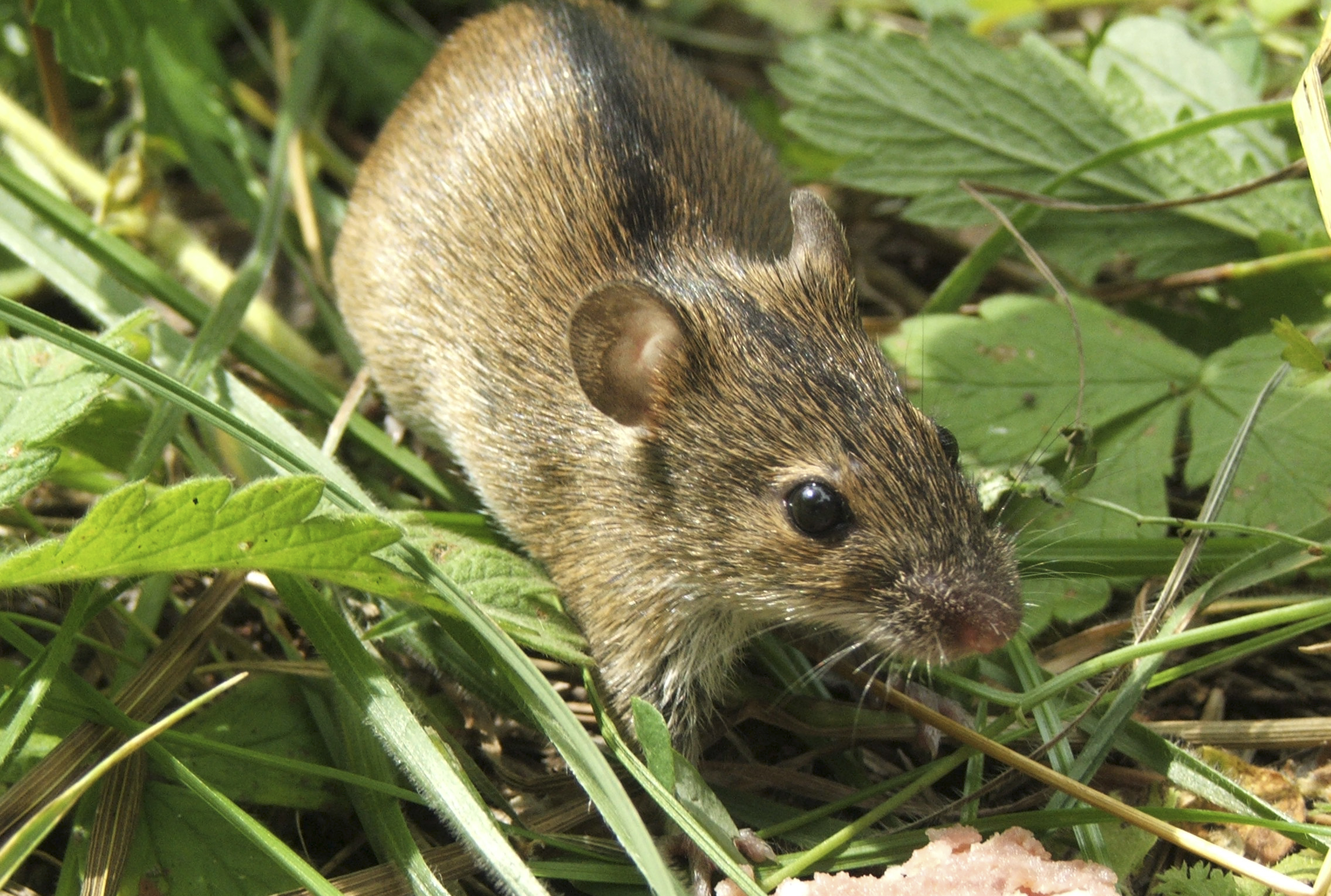 Полевая мышь. Бекарюковский бор в Шебекинском районе Белгородской области России.